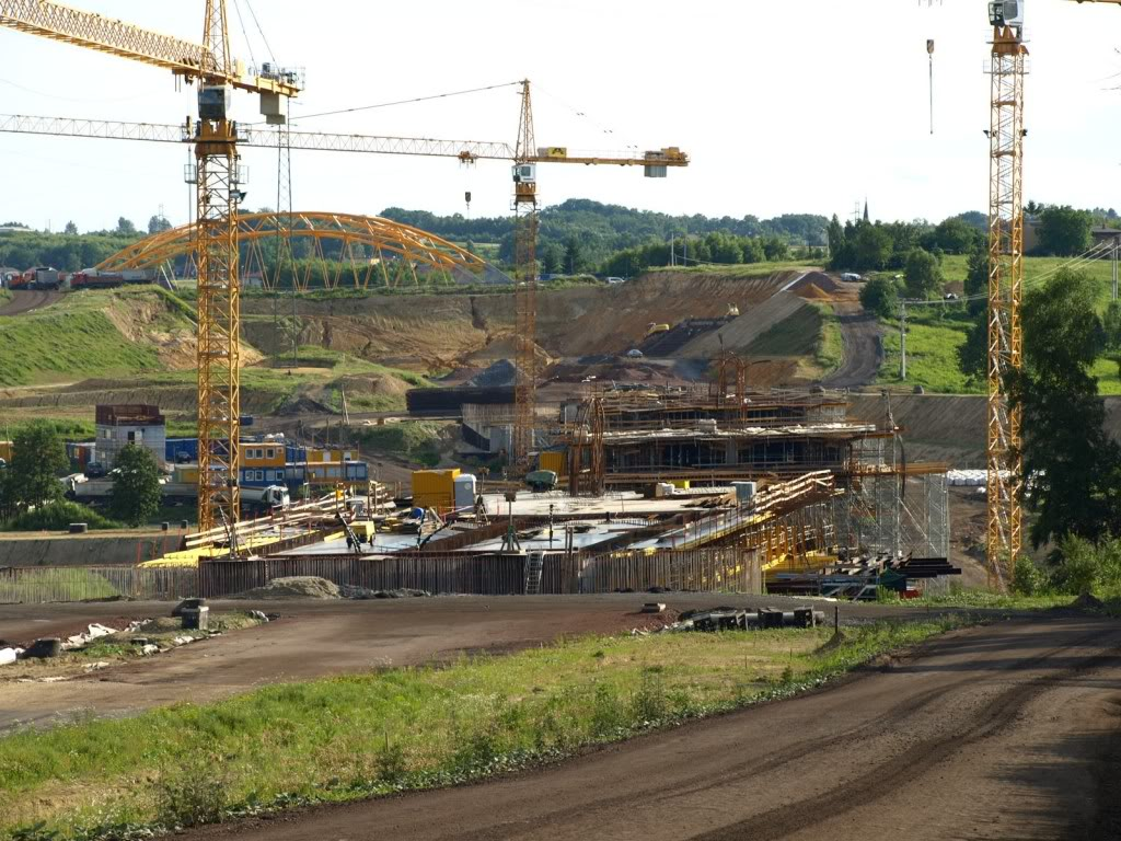 Die im Bau befindliche polnische Autobahn A1 auf dem Abschnitt Świerklany-Gorzyczki im Juni 2011. Ein Brückenbauwerk ist zu sehen.